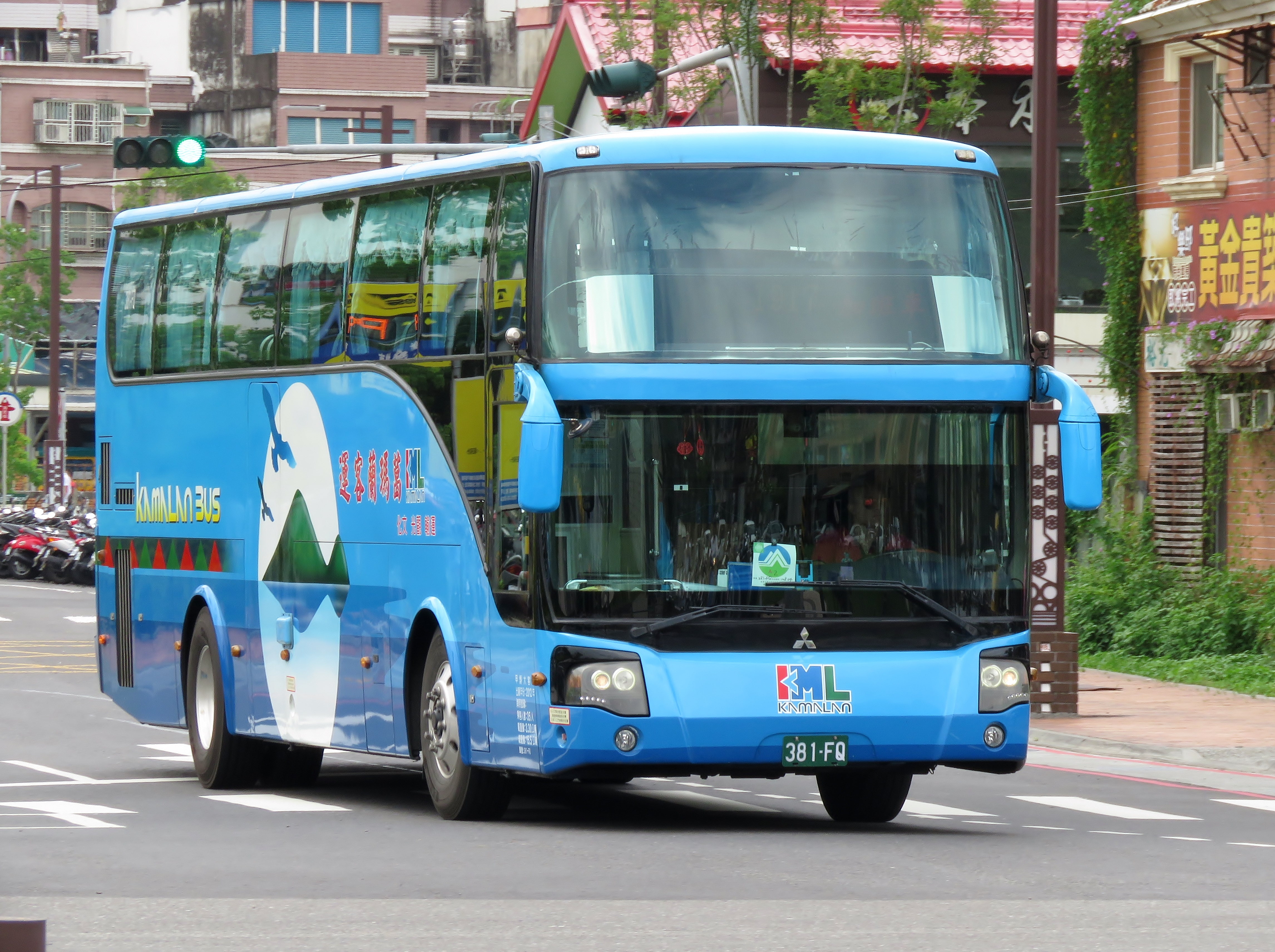 中文（台灣）: 葛瑪蘭客運2013 MITSUBISHI FUSO RM11GNL3 381-FQ 暫停服務